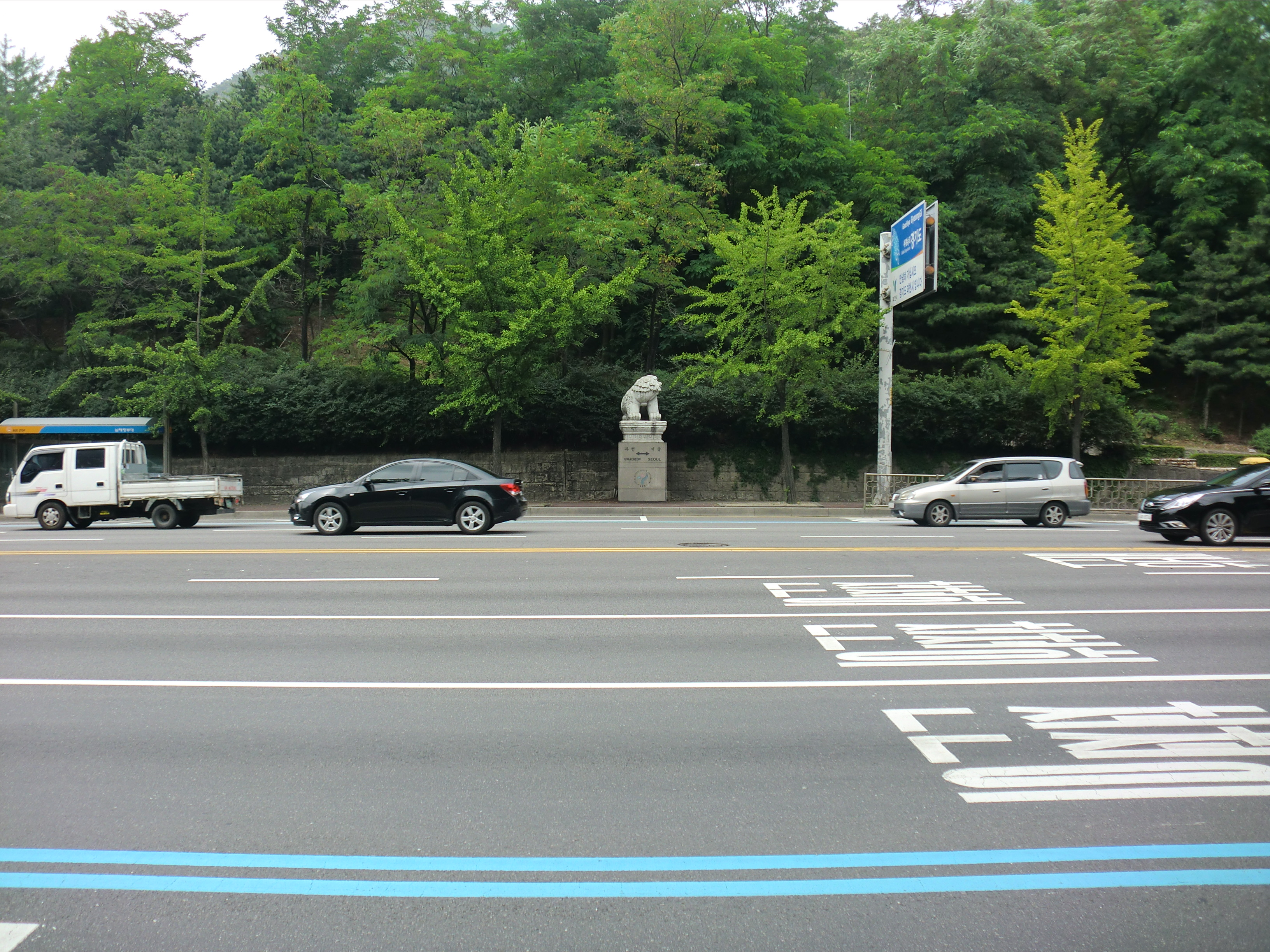 남태령로에 있는 경기도 과천시와 서울특별시 서초구의 경계